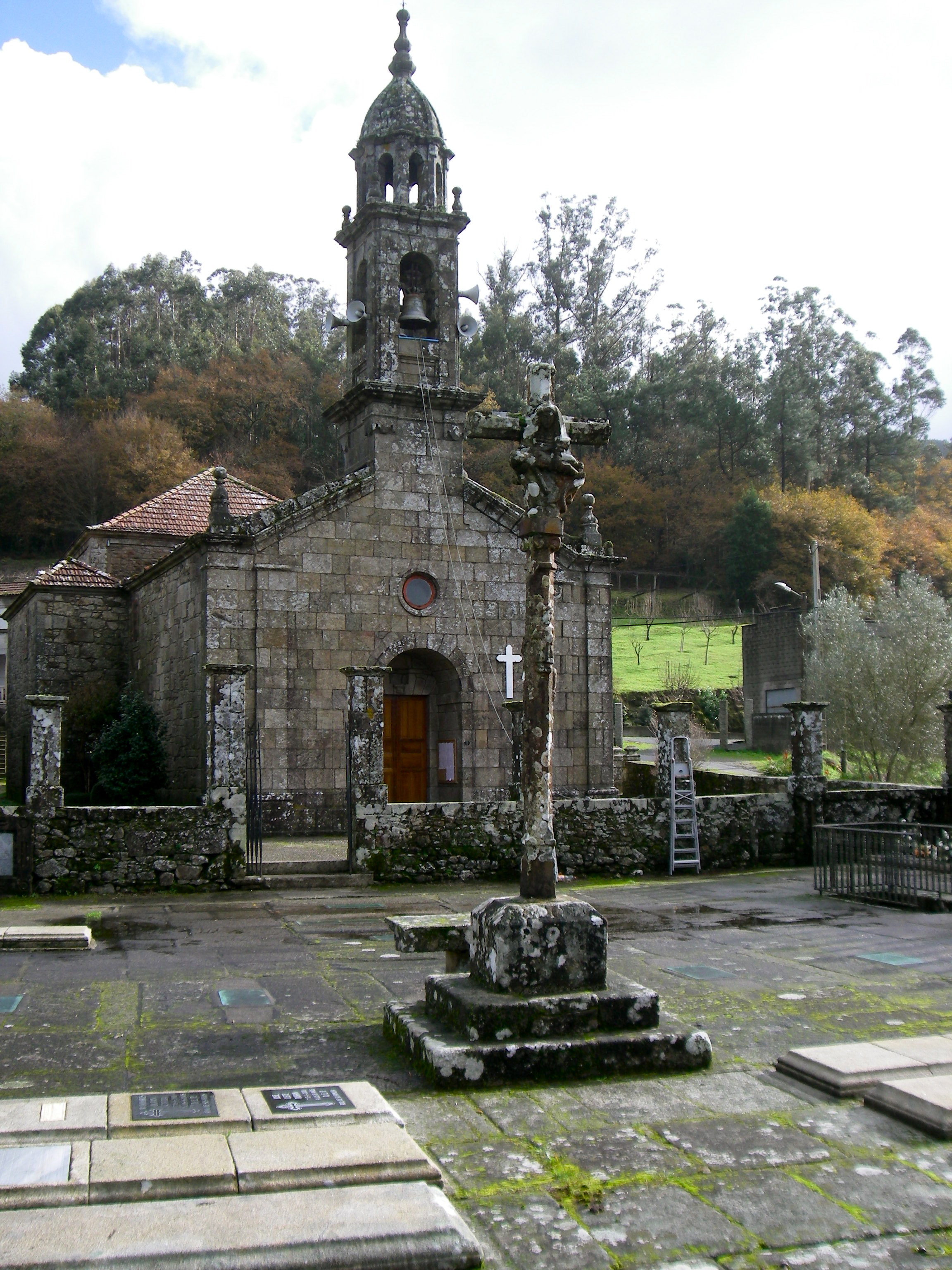 Cemiterio, cruceiro e Igrexa de Arcos